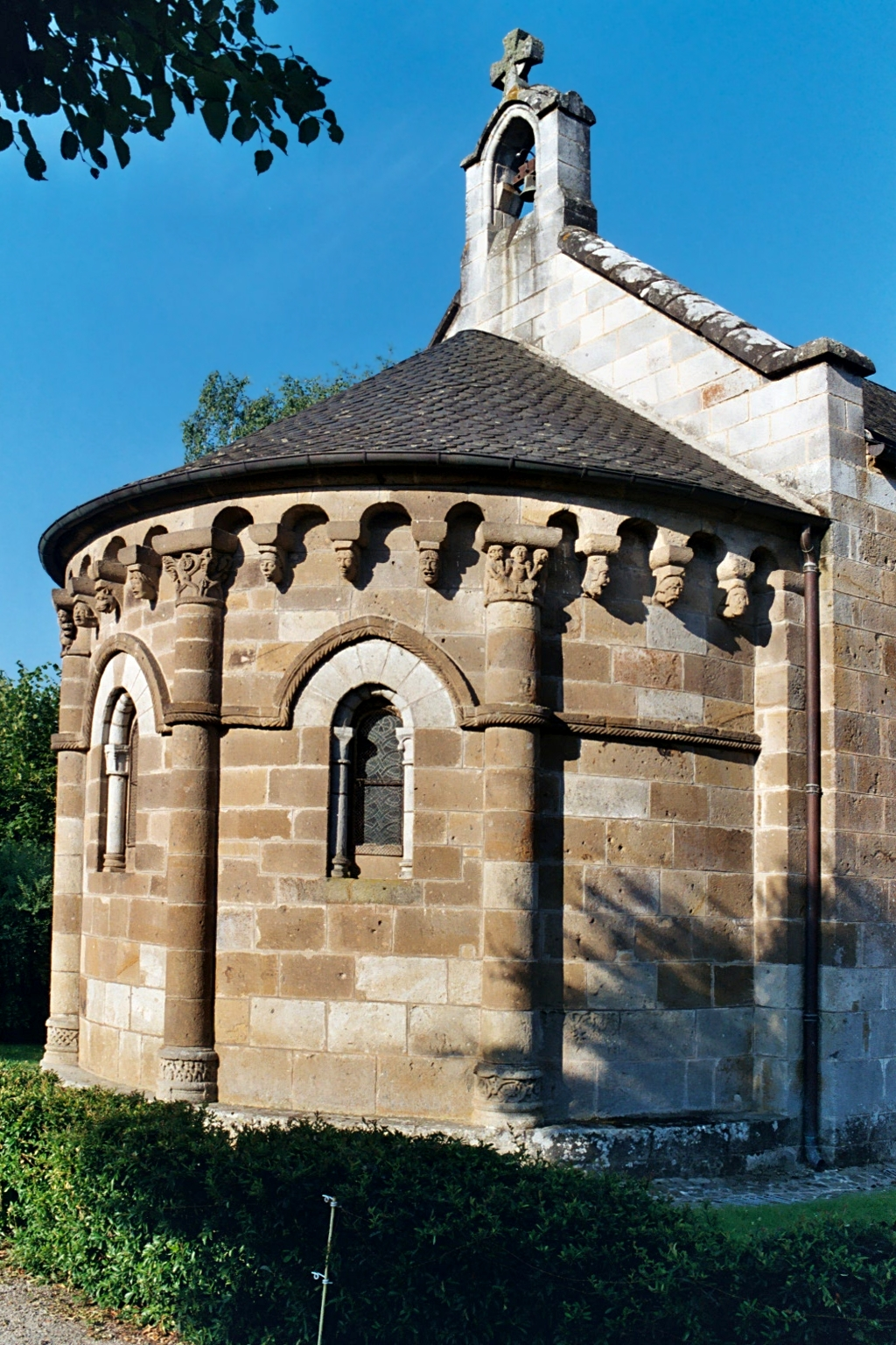 France - Auvergne - Cantal - Église Saint-Georges d'Ydes-Bourg